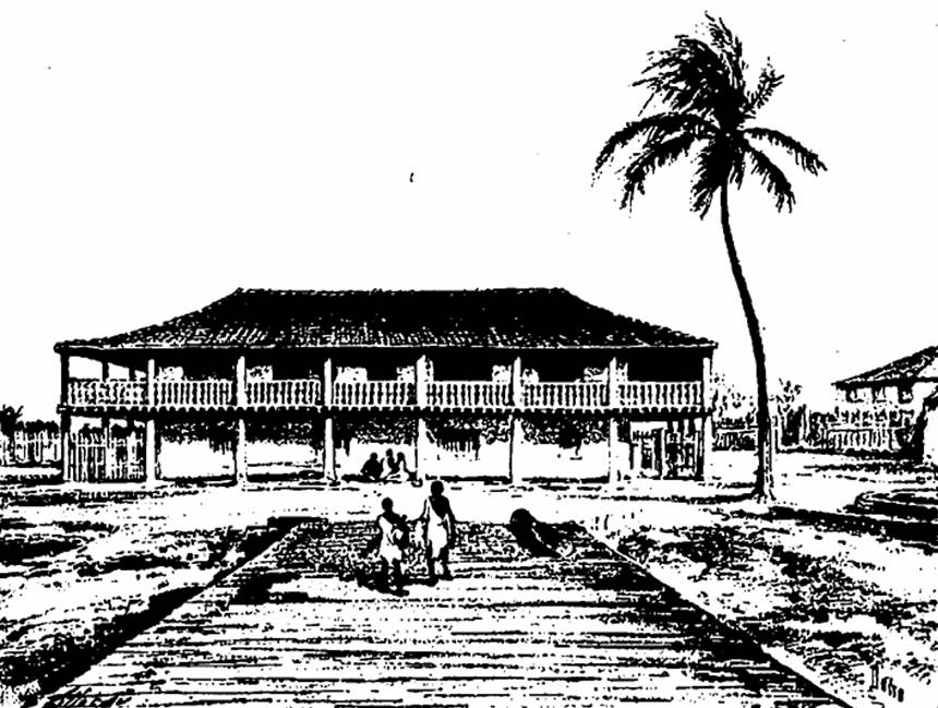 Factorerie n° 2 de la Compagnie de la Casamance à Carabane (Casamance, Sénégal)